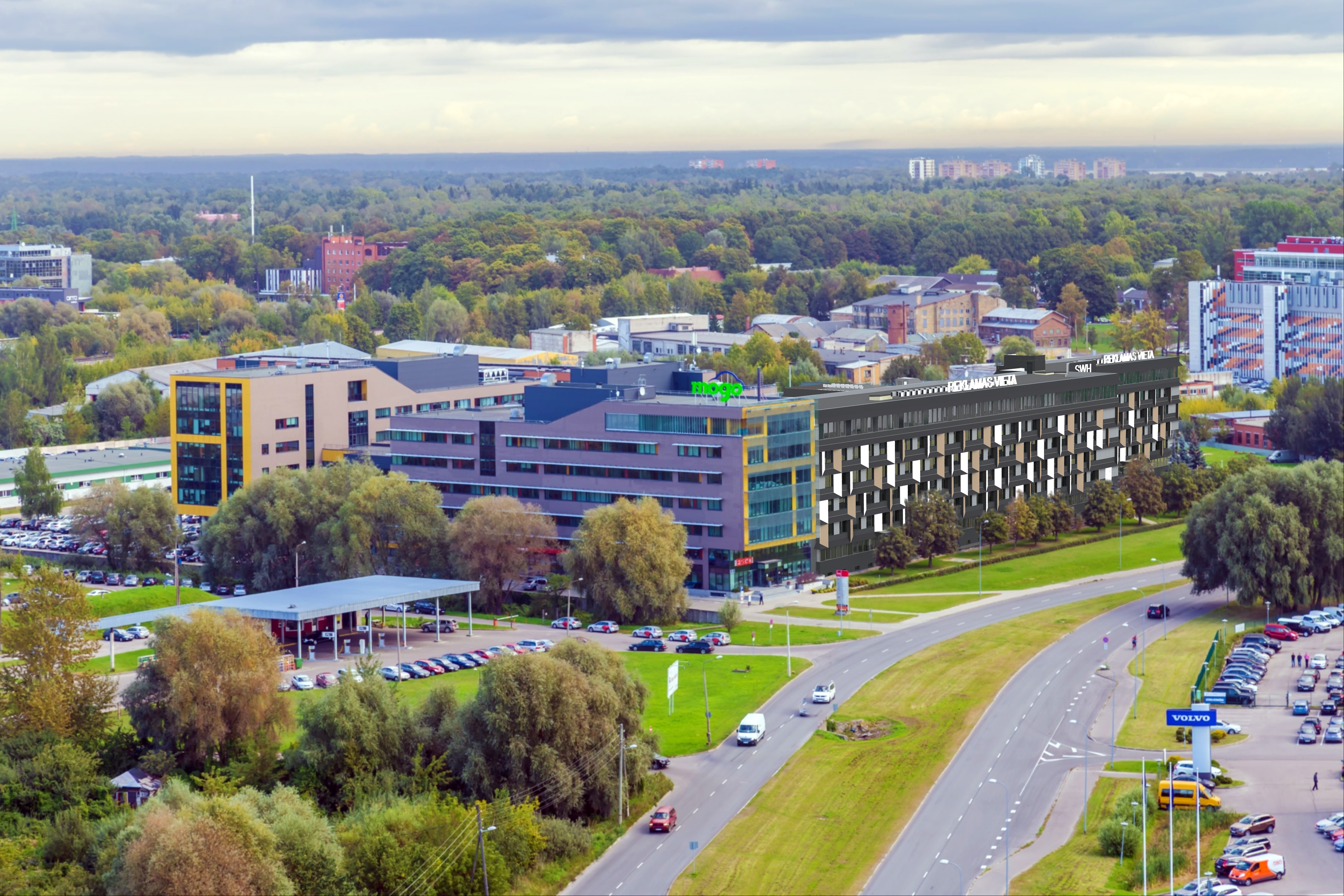 SWH biroju centrs